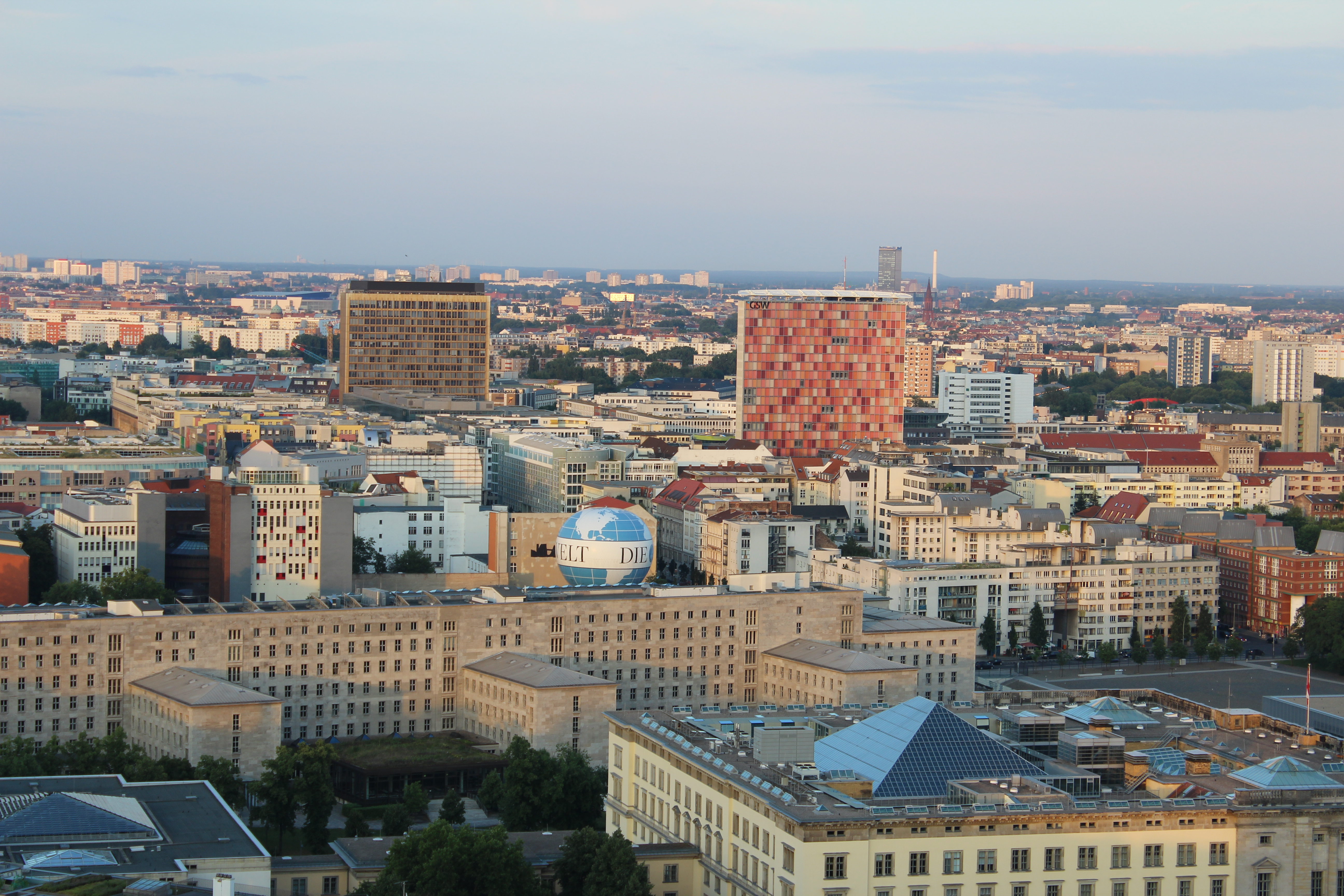 Berlin, Axel-Springer-Hochhaus (li.) und GSW-Hochhaus